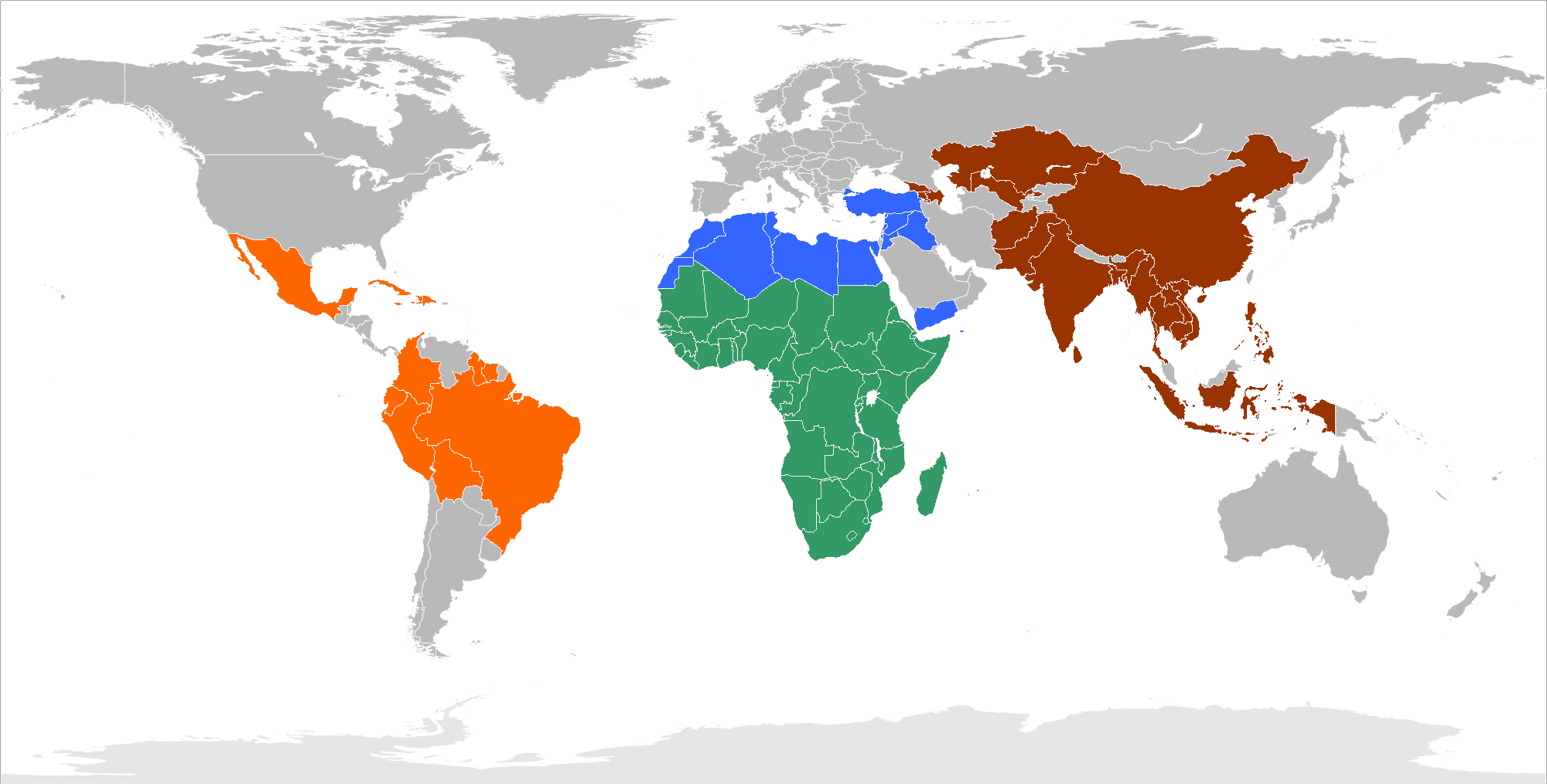 Afrique subsaharienne Amérique latine et Caraïbes Asie Méditerranée et Moyen-Orient